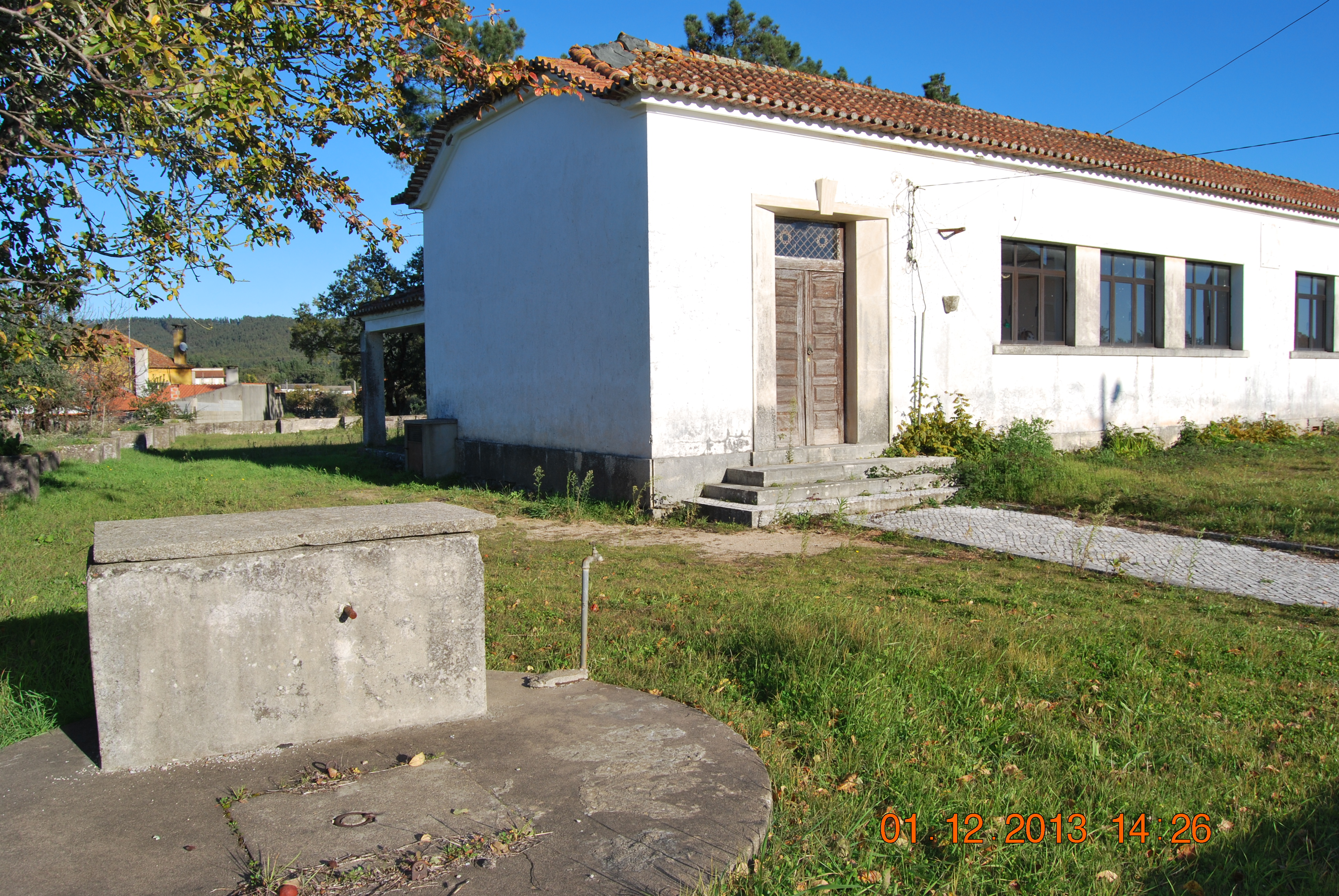 Escola